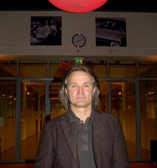 Spiritueel ondernemer Ronald Jan Heijn tijdens de zogenoemde 'sneak-preview' van zijn film 'Staya Erusa: Find the Book of Knowledge'. Foto gemaakt in de oude Verkadefabriek (tegenwoordig een bioscoop) van Den Bosch.